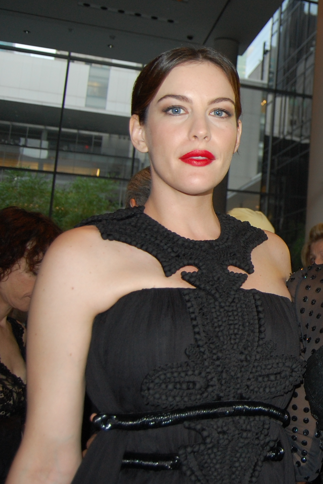 Liv Tyler, March 2007.